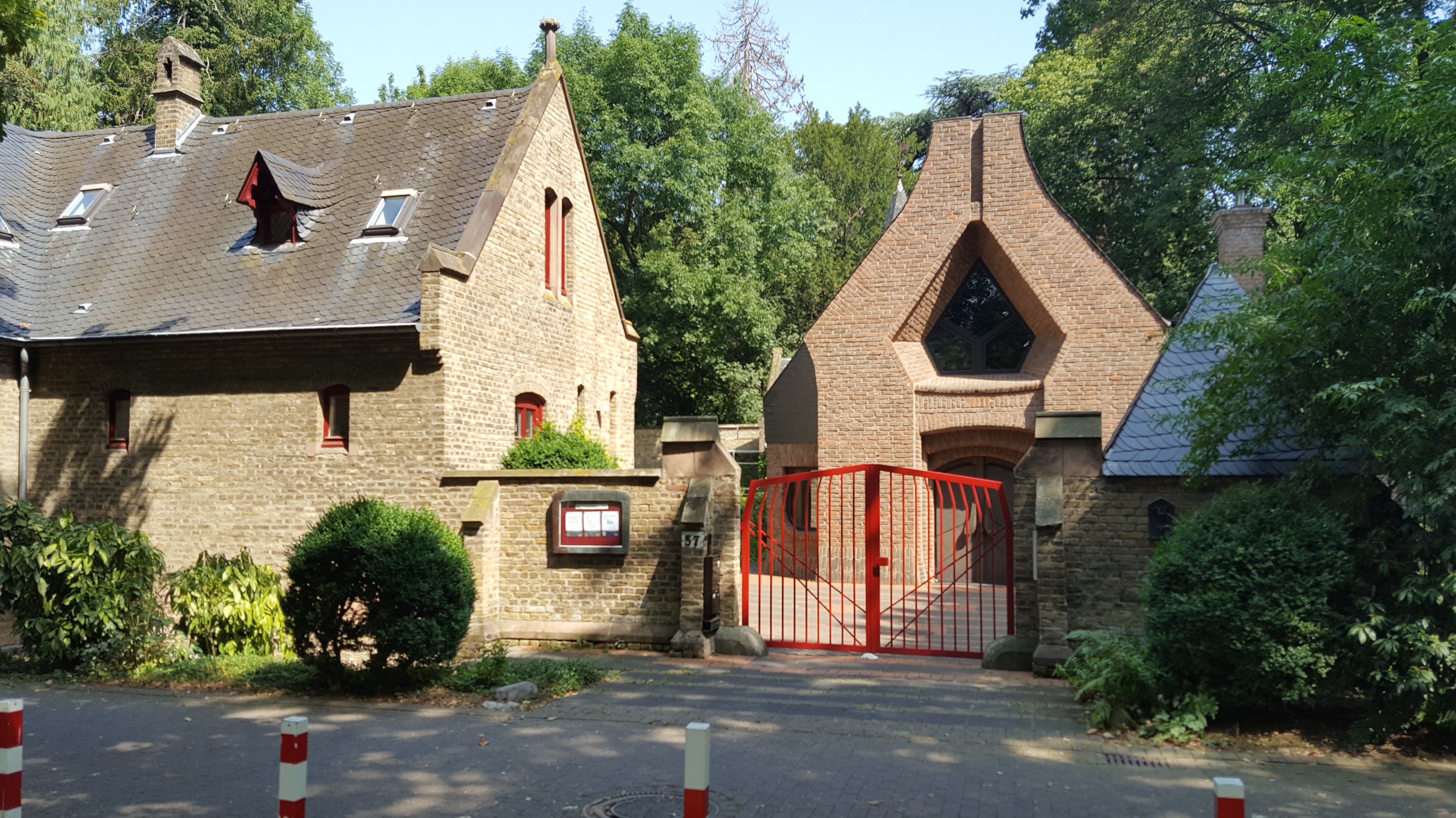 Michael-Kapelle, Am Büchel 57, Bonn-Plittersdorf (Stadtbezirk Bad Godesberg)